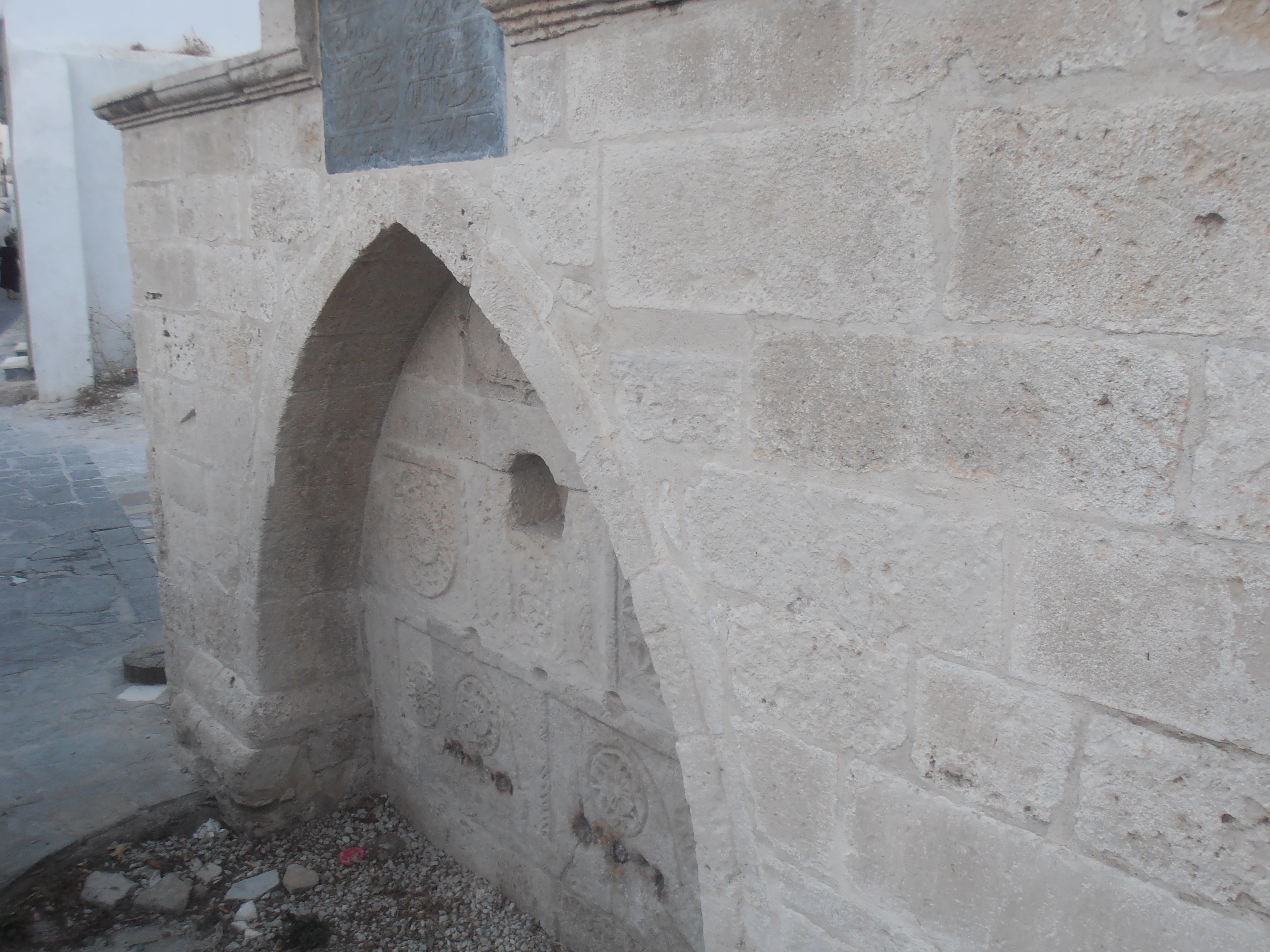 Η βρύση του Καρακάση στην Ιεράπετρα. Από πάνω της υπάρχει επιγραφή στα αραβικά, η οποία δεν έχει διαβαστεί ακόμα.